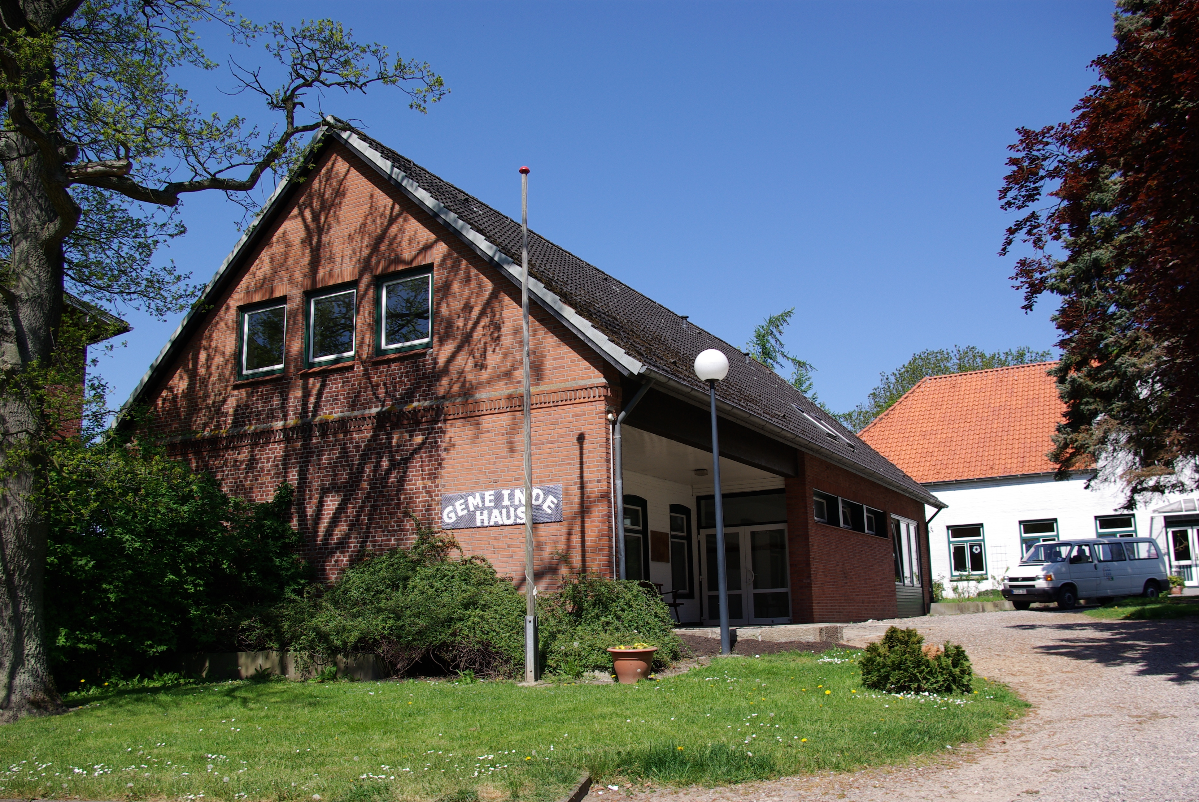 Karby In Schleswig-Holstein. Das Gemeindehaus befindet sich in der Dorfmitte.